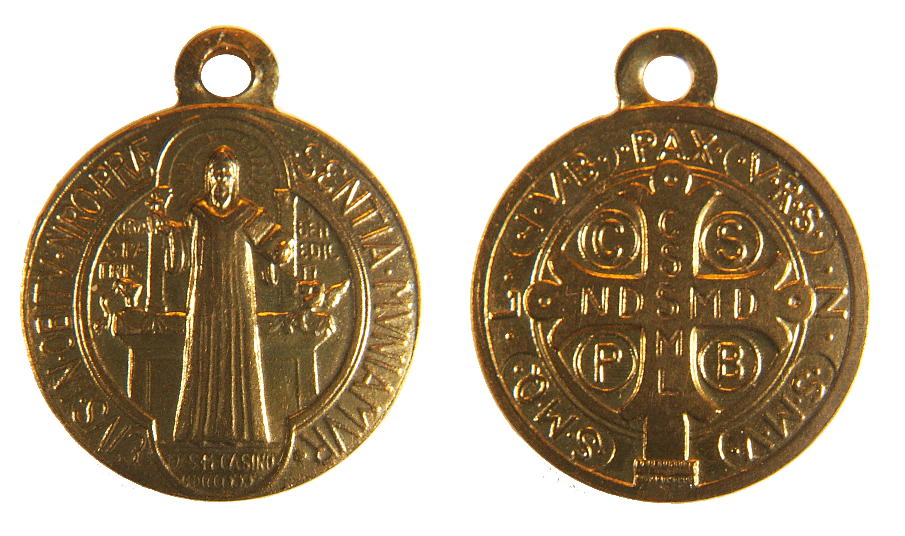 Medaille de Saint Benoît Verso recto Taille originale ⌀=1.5cm